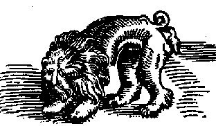 Lejonklippt vattenhund (1553)